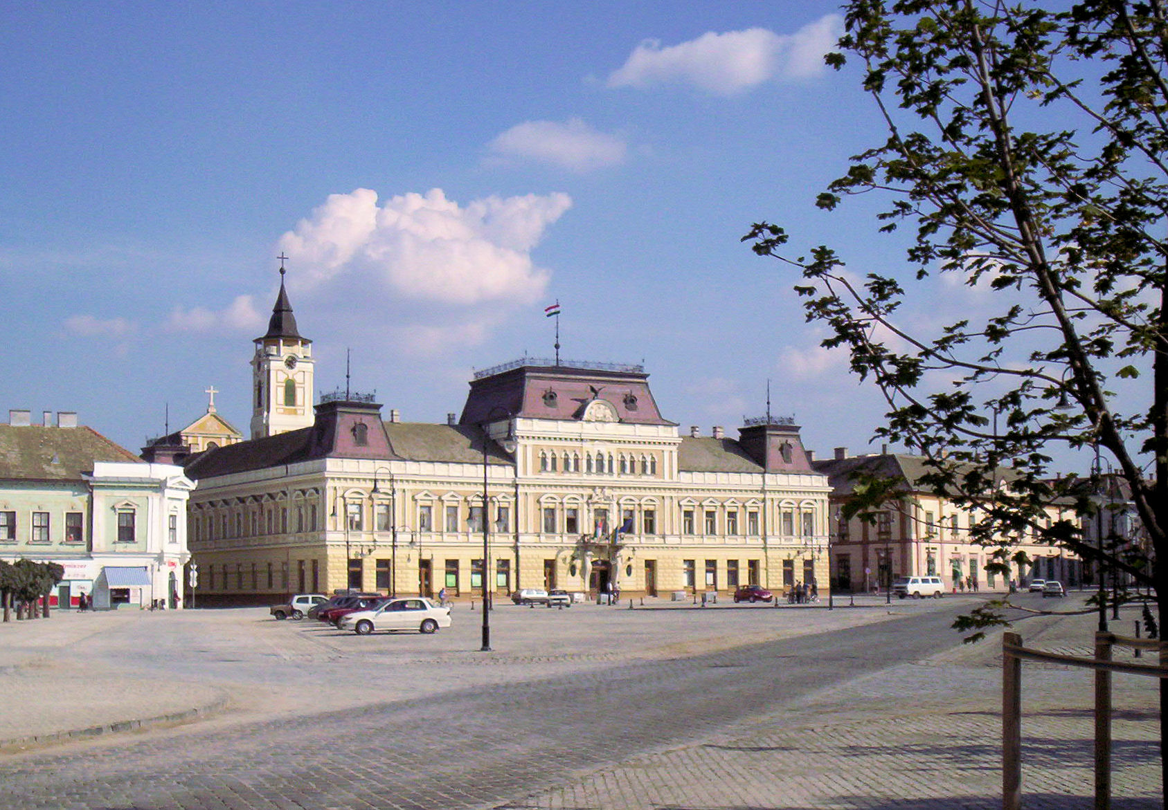 A bajai városháza (egykori Grassalkovich-palota) – photo taken by uploader User:Csanády in 2006.